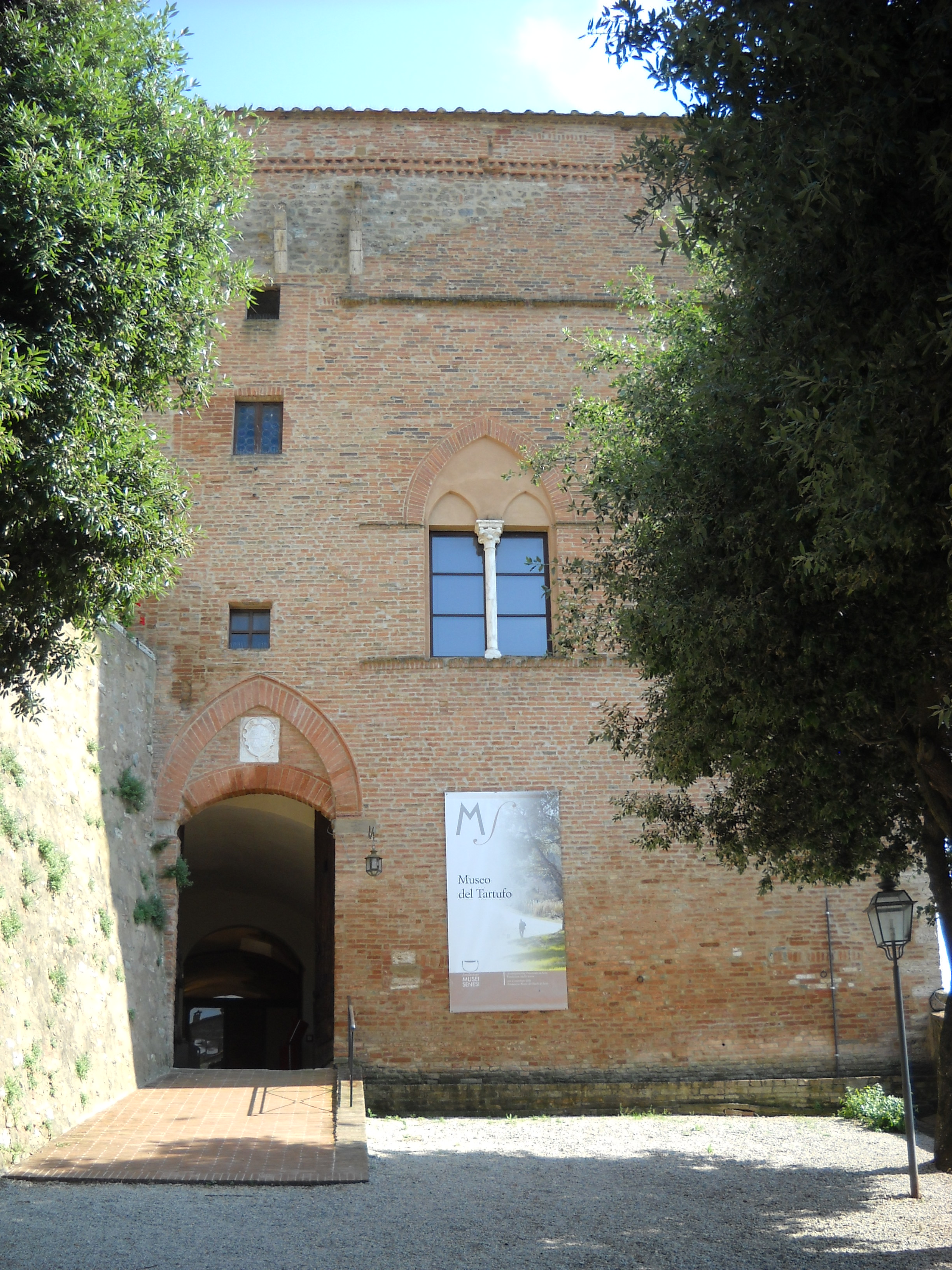 La facciata principale con il grande portone ad arco senese della Rocca di San Giovanni d'Asso, in provincia di Siena.